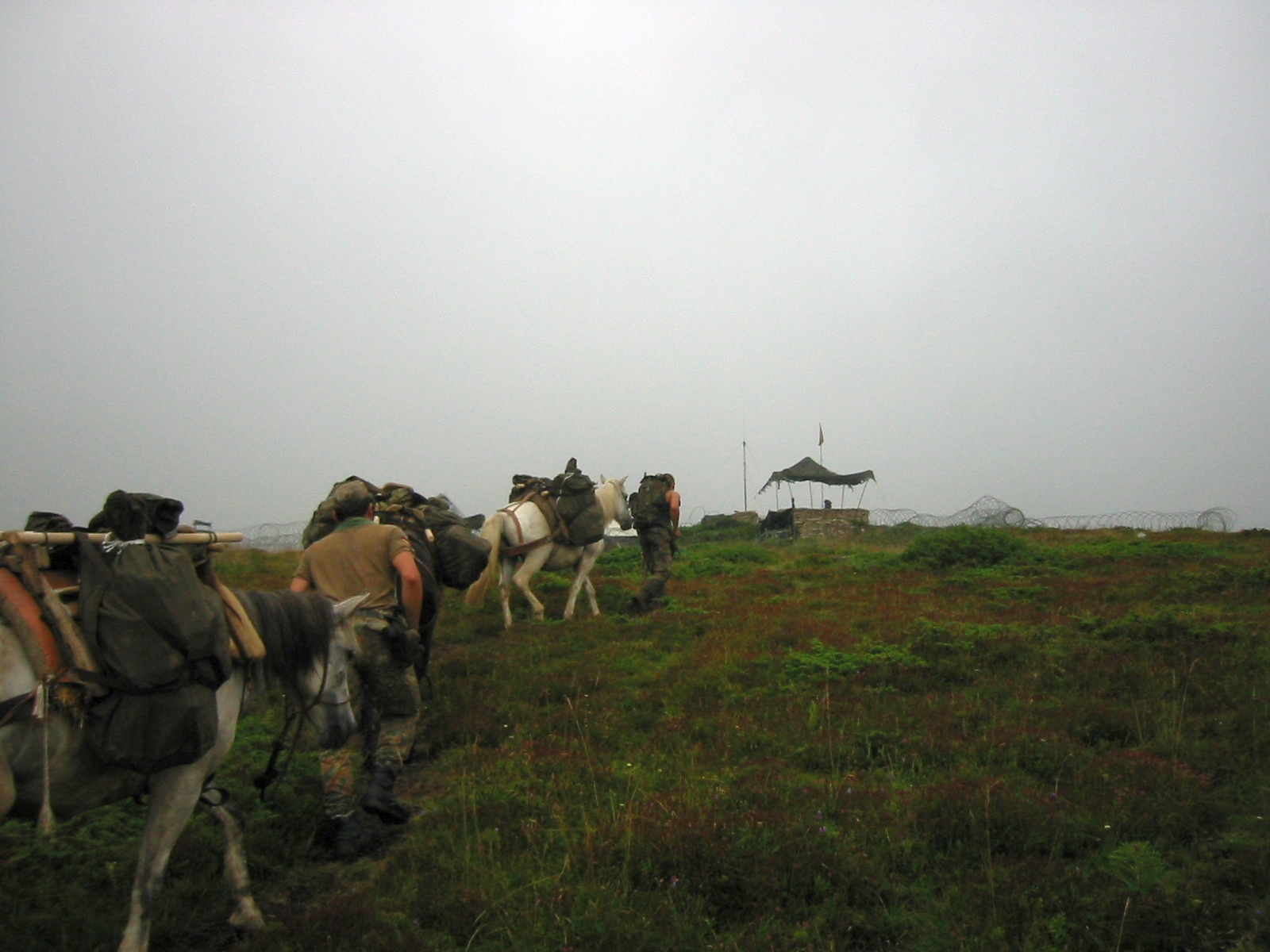 Soldaten des Tragtierwesen 230 und PzGrenBtl 391 bei der Versorgung des Observation Point Zitadelle (auf 2.400 m Seehöhe) im Kosovo 2002. Die Aufnahme entstand während der Tragtiererprobung des deutschen Heereskontingentes. Eingesetzt wurden einheimische Tiere. Vom 16. August bis zum 6. November 2002 wurden 13.300 kg transportiert was 34 Lifts von Hubschraubern entspricht.